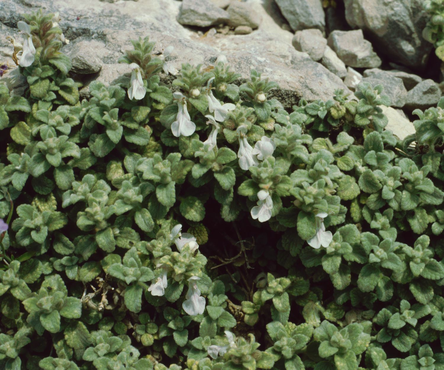 Stachys ionica, Lippenblütler (Lamiaceae) – Griechenland/Ελλάδα/Greece: Erisos/Έρισος, Assos/Άσσος, Südhang des Festungsbergs (Kefallinia/Κεφαλληνία)